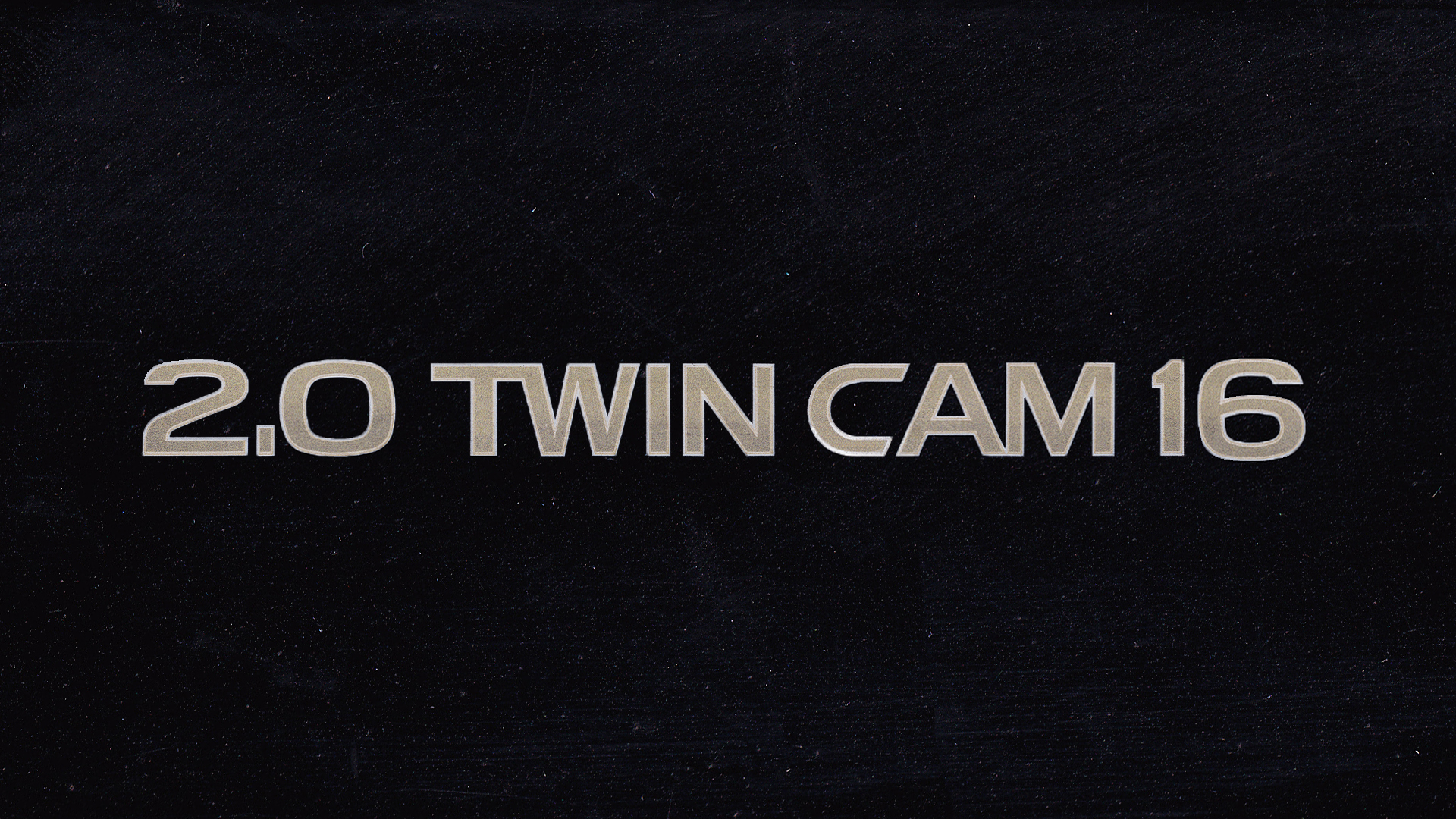 Скан молдинга TOYOTA Vista SV21 GT